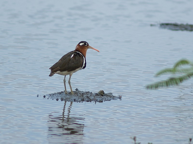 Rostratula benghalensis 彩鷸